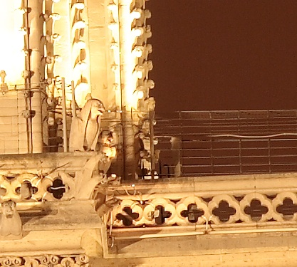 d'absence d'erreur de stitching